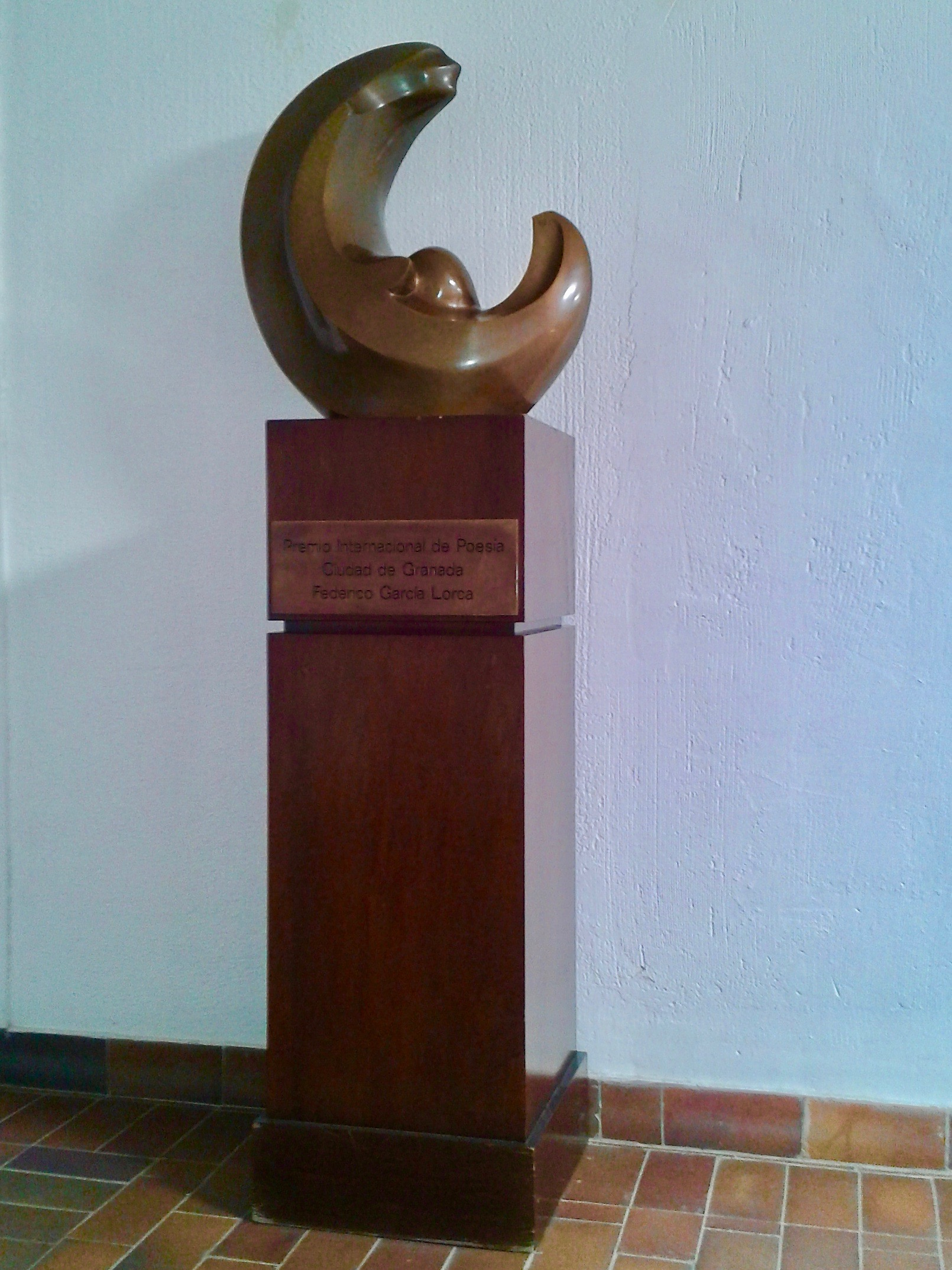 Escultura «Luna» (1974), del artista granadino Miguel Moreno. Con unas medidas de 62 x 60 x 27 cm es el símbolo del Premio Internacional de Poesía Federico García Lorca. De ella se realizan réplicas de menor tamaño para entregar a los premiados.